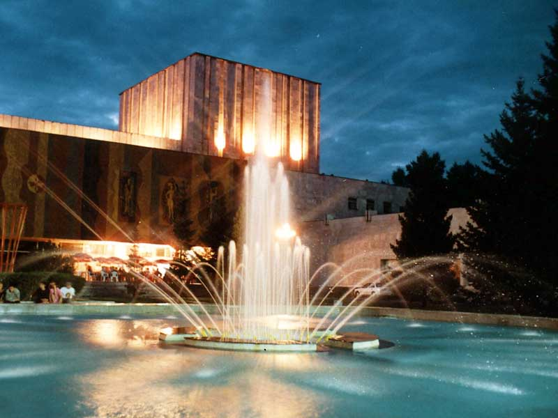 Русский республиканский драматический театр имени М. Ю. Лермонтова